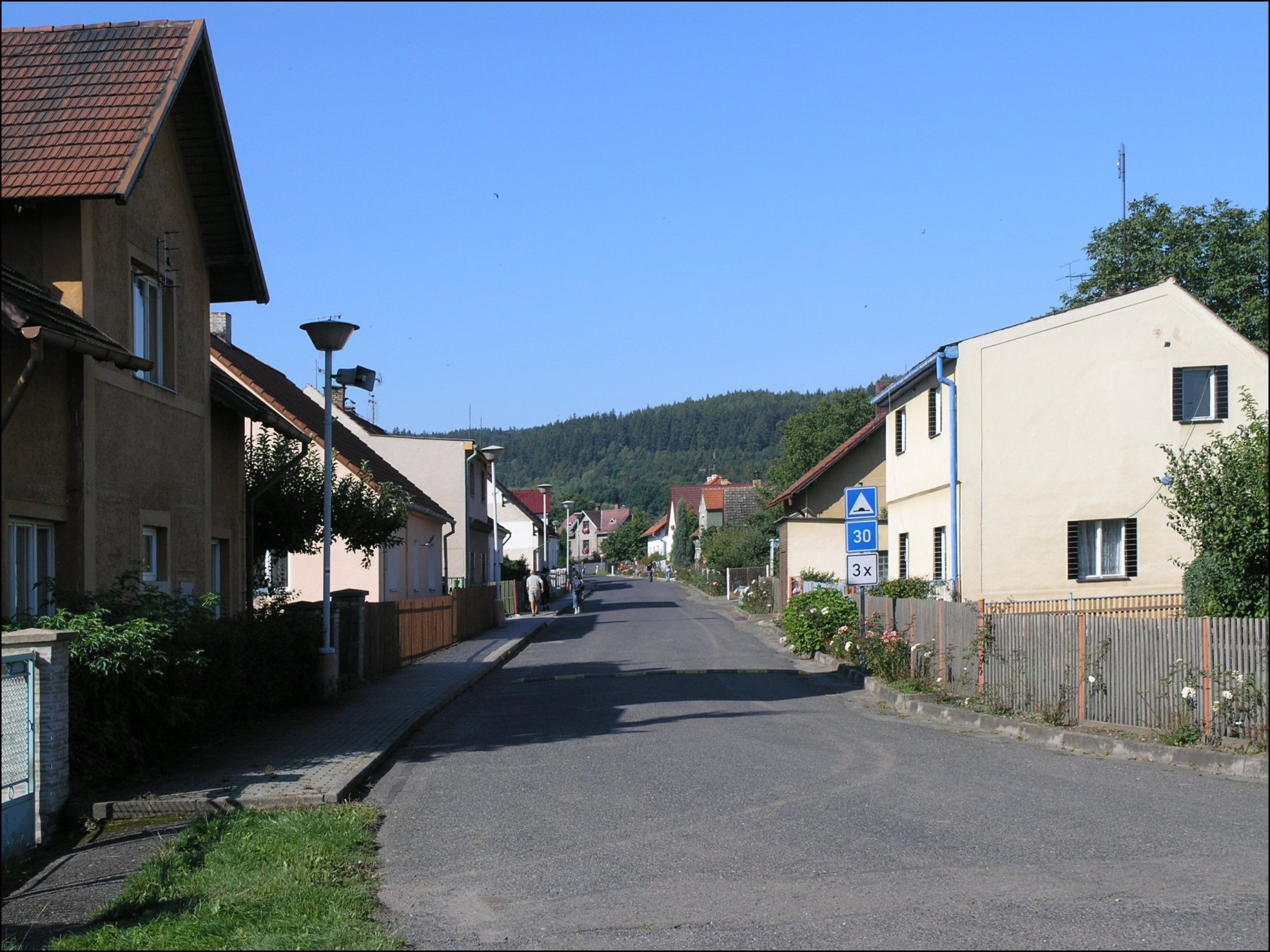 Blatno (okres Louny)